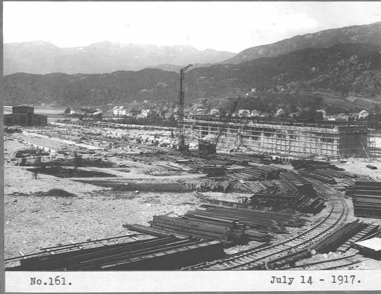 Den første fasen av utbyggingen på Klubben.